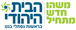 Logo der israelischen Partei HaBajit haJehudi (הבית היהודי)